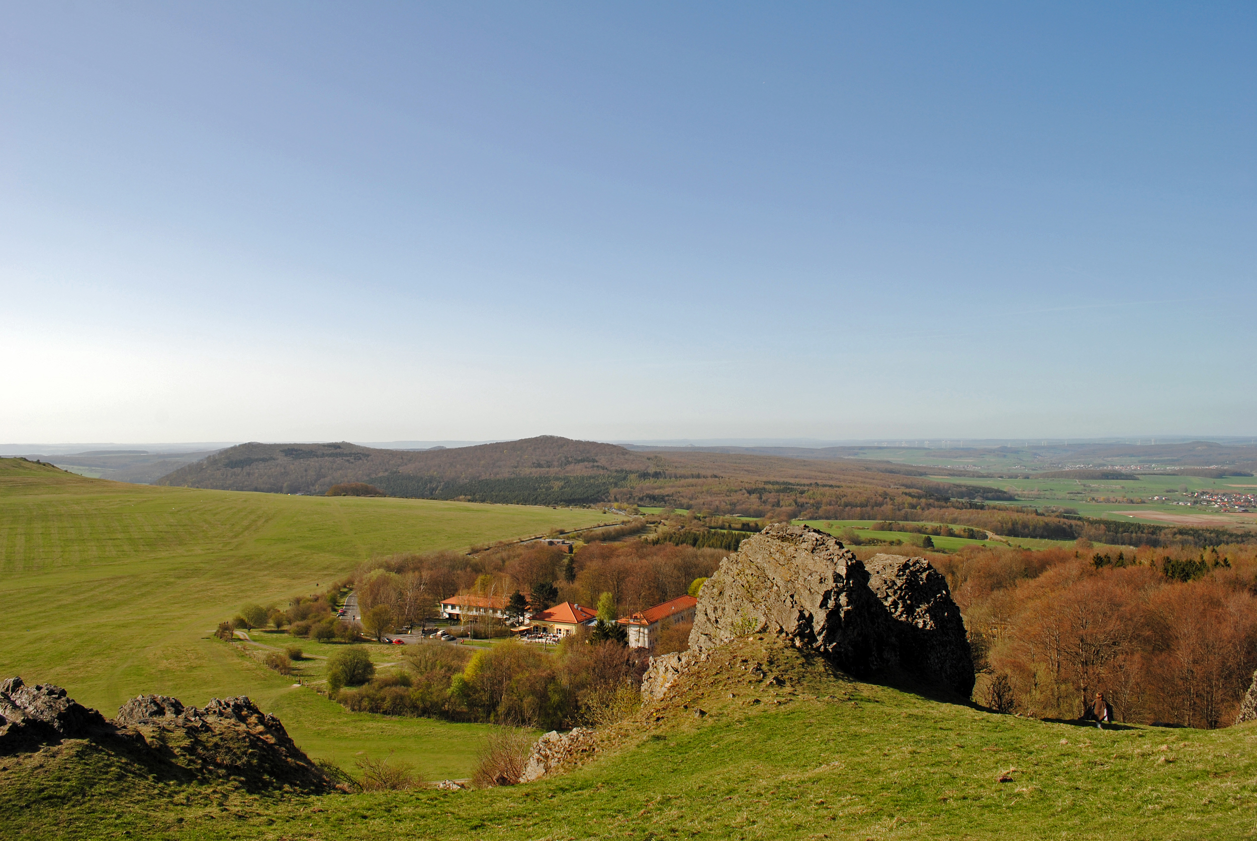 Blick von den Helfensteinen (Naturdenkmal, gelegen im FFH-Gebiet „Dörnberg, Immelburg und Helfenstein“) übers Land; Bereich im Naturpark Habichtswald.